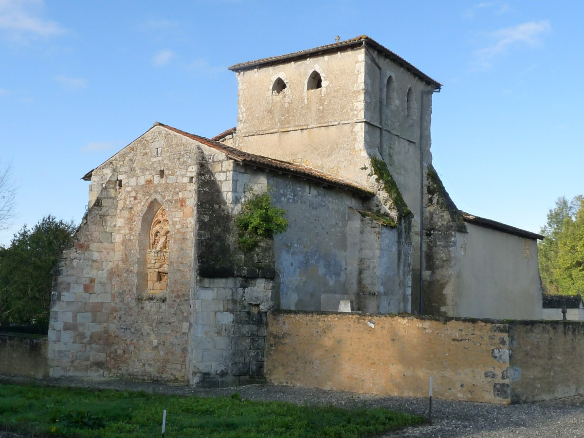 Eglise de Challaux, Montlieu-la-Garde, Charente-Maritime, France